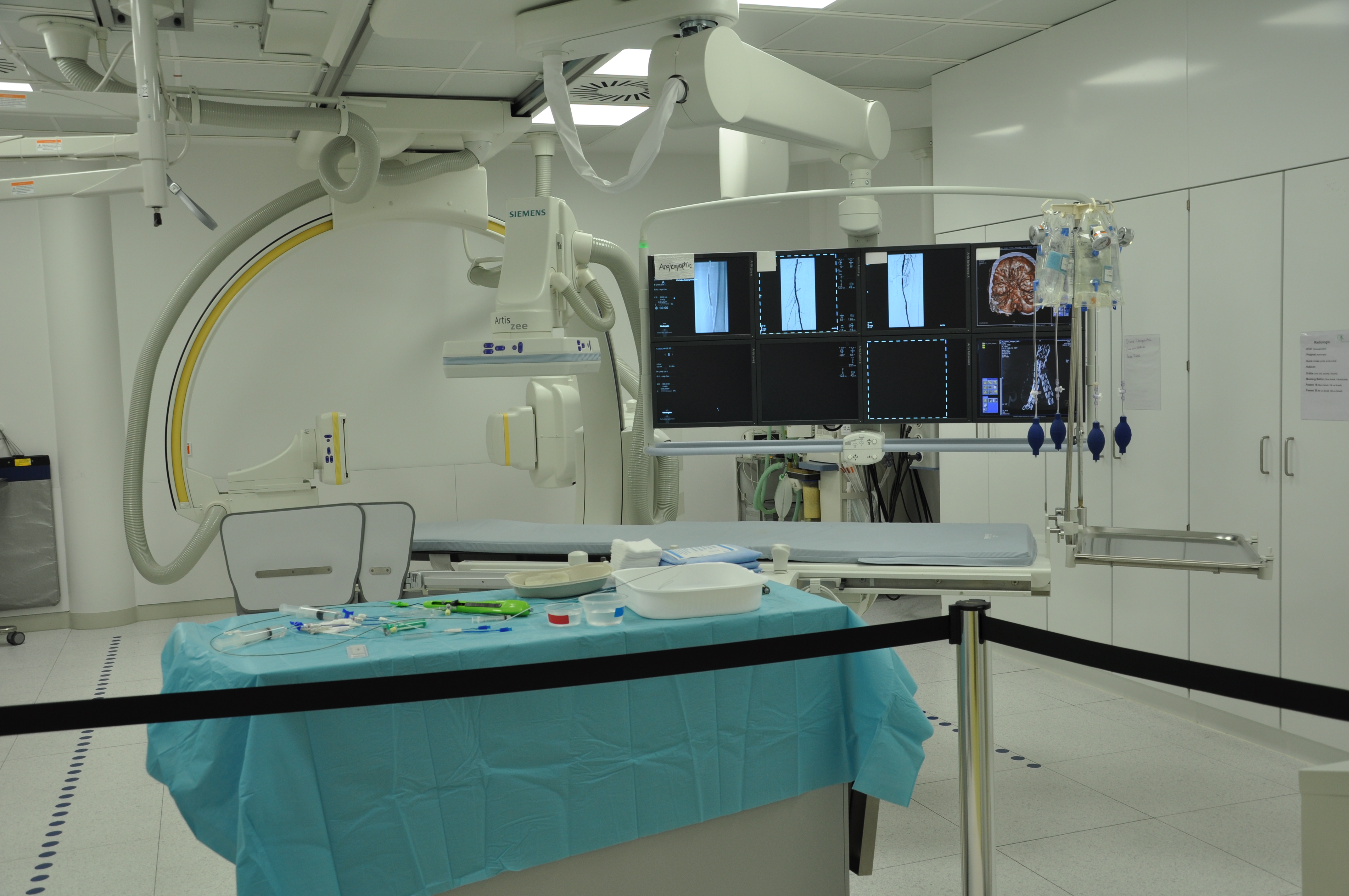 Ravensburg, Krankenhaus St. Elisabeth, Abteilung Radiologie, Angiographie (am tag der offenen Tür 2013)